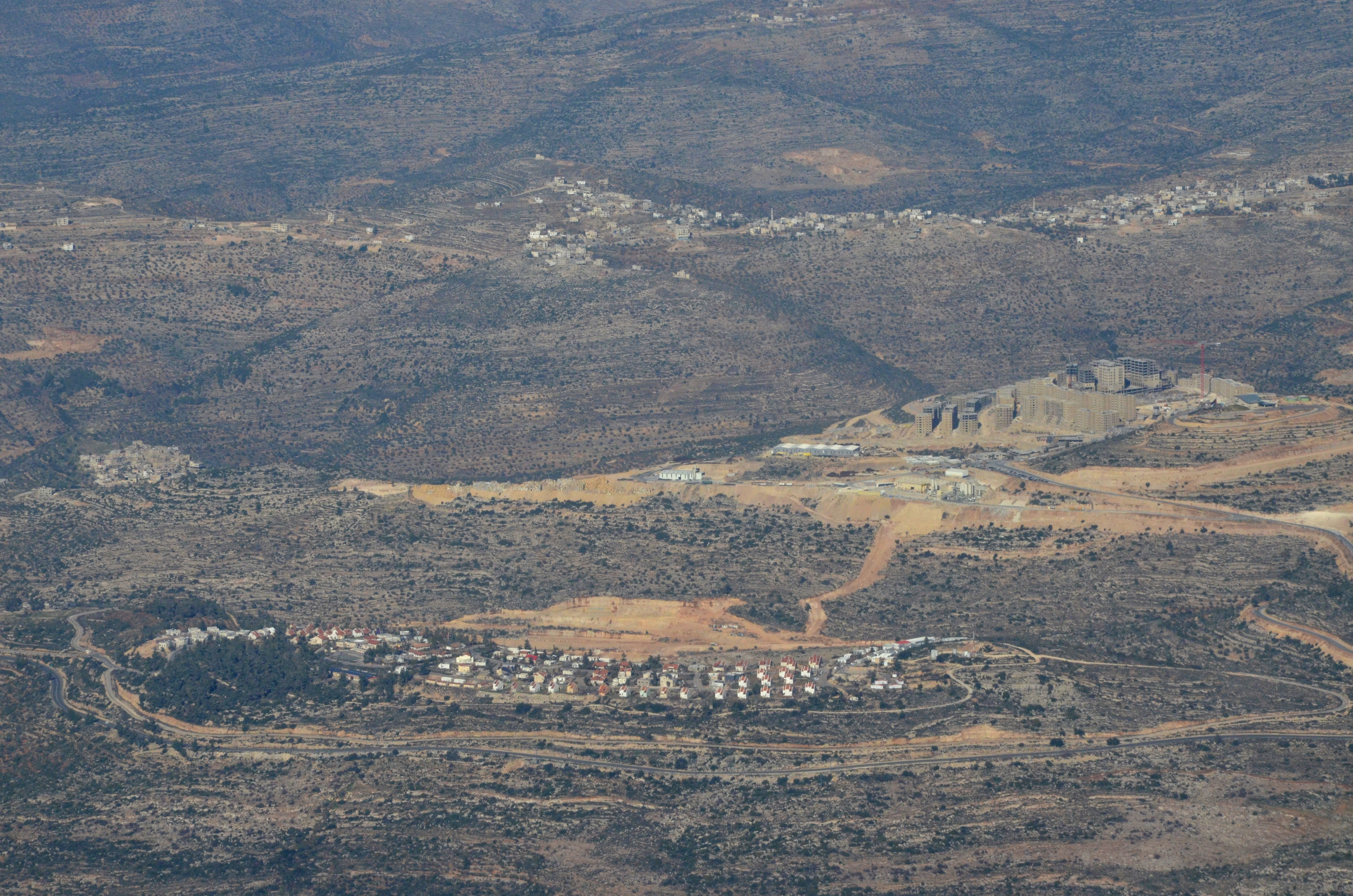 הישוב עטרת והעיר רוואבי (בבניה)